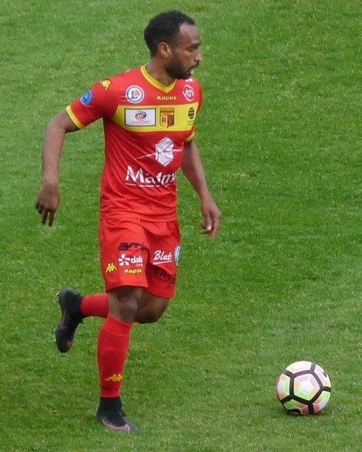 Gary Marigard, sous le maillot de Quevilly-Rouen, lors de la saison 2016-2017.